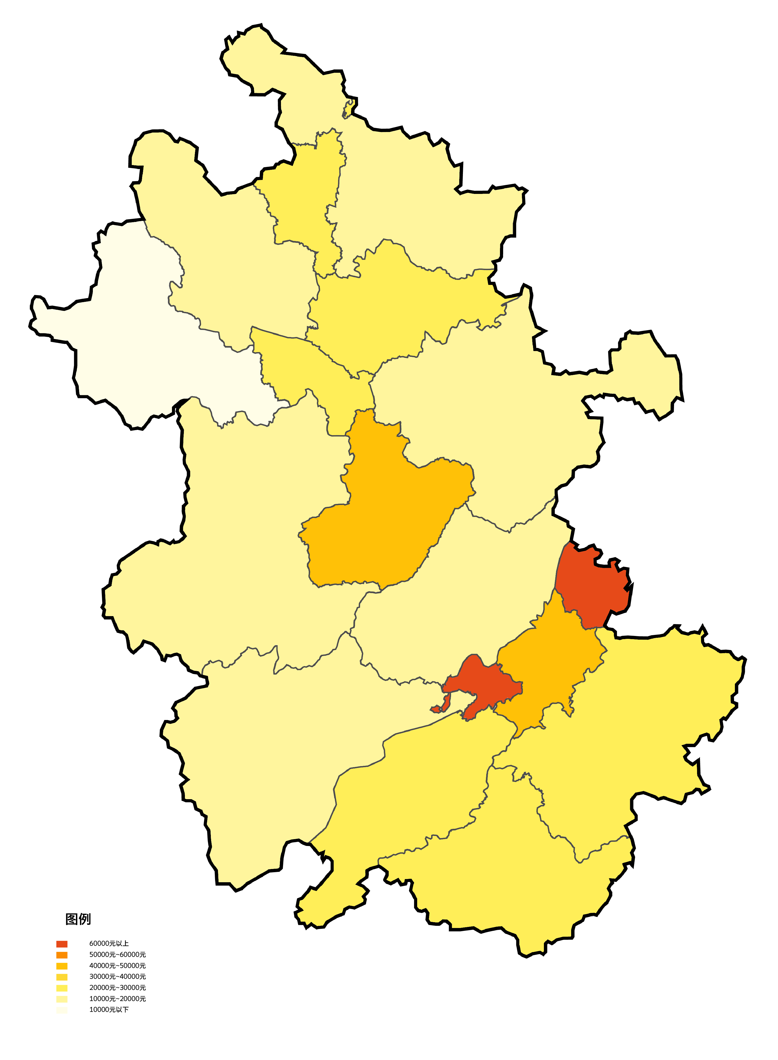 中文（中国大陆）: 安徽省各地级市根据2010年人均地区生产总值填色地图